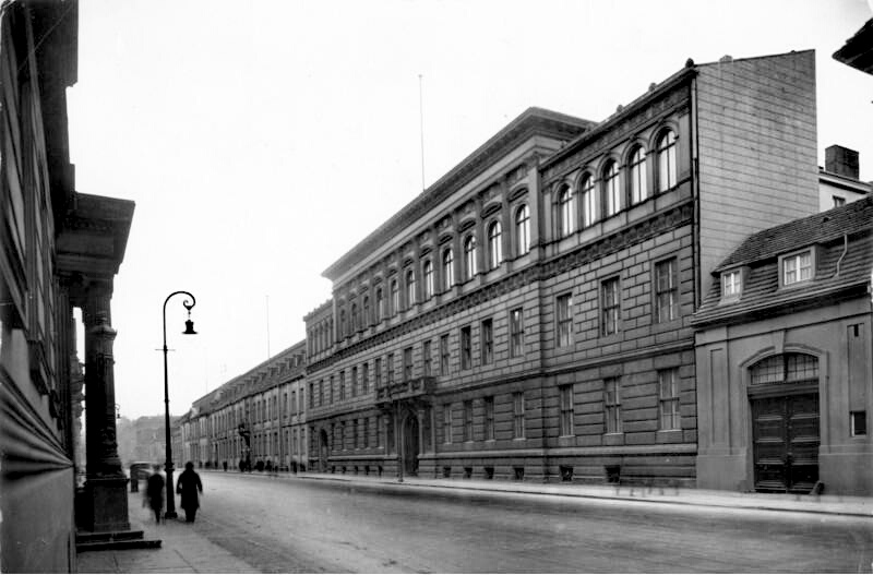 Zentralbild Berlin 1927 Das Auswärtige Amt in der Wilhelmstraße, von der Behrenstraße gesehen. [Scherl Bilderdienst] Anm.: Es handelt sich um das Gebäude Wilhelmstraße 74 (bis 1919 Reichsamt des Innern). Links anschließend das Reichspräsidentenpalais (Wilhelmstraße 73)